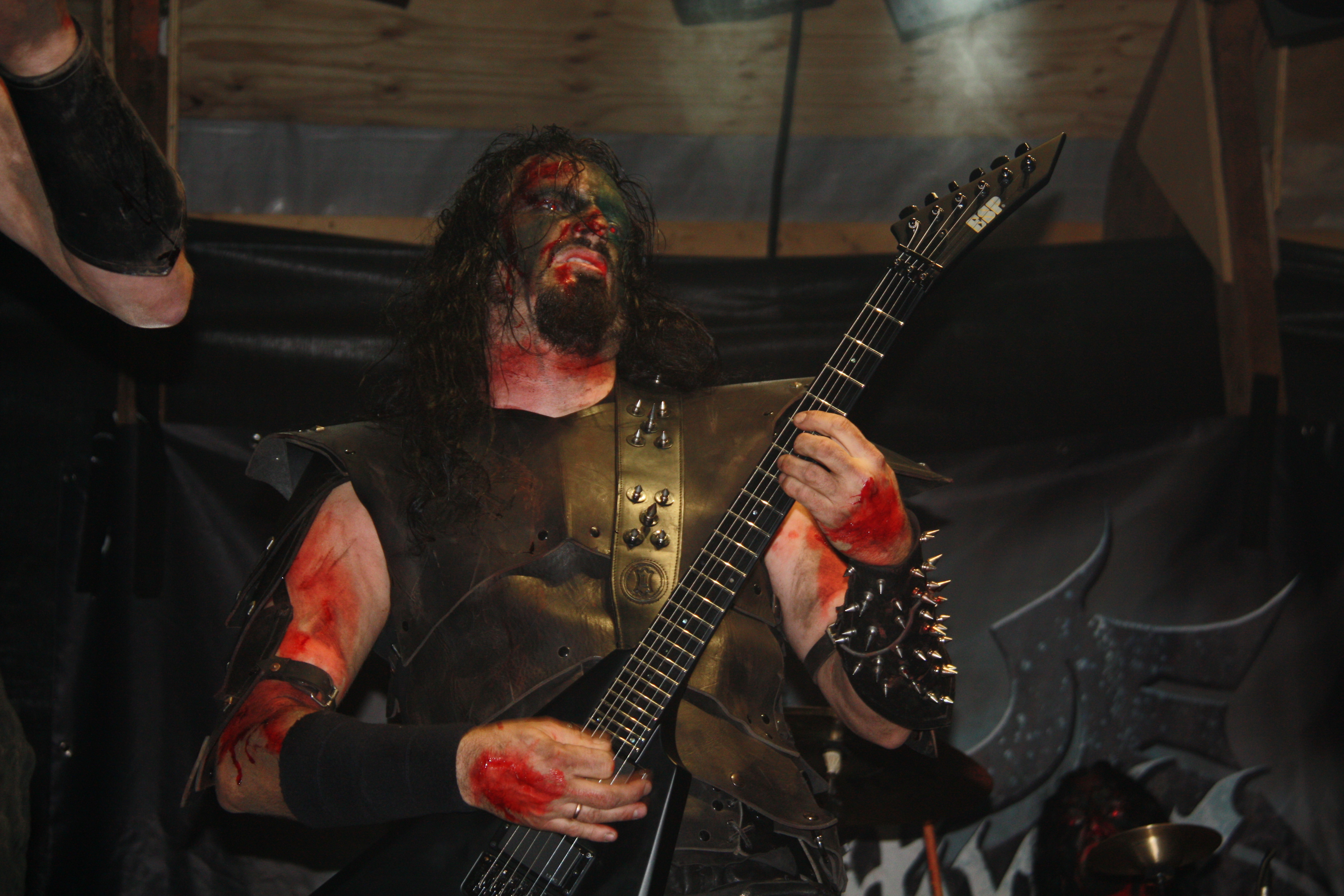 Slechtvalk tijdens Occultfest 2010, zaterdag 4 september